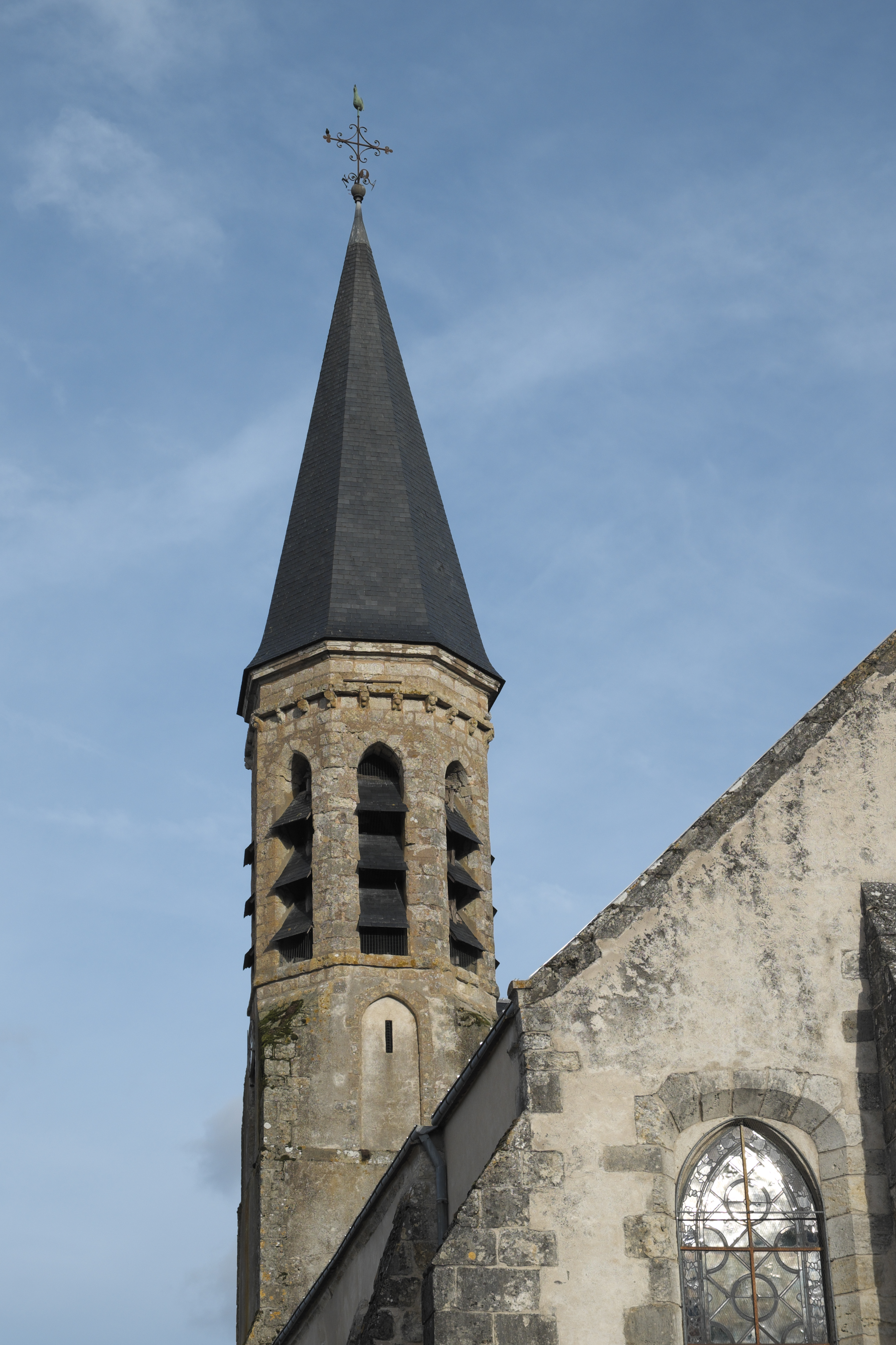 Katholische Pfarrkirche Saint-Martin in Malesherbes im Département Loiret (Centre-Val de Loire/Frankreich), Glockenturm